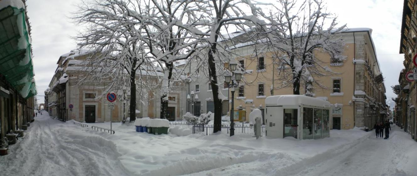 Piazza Regina Margherita in L'Aquila dopo la nevicata del 4 febbraio 2012